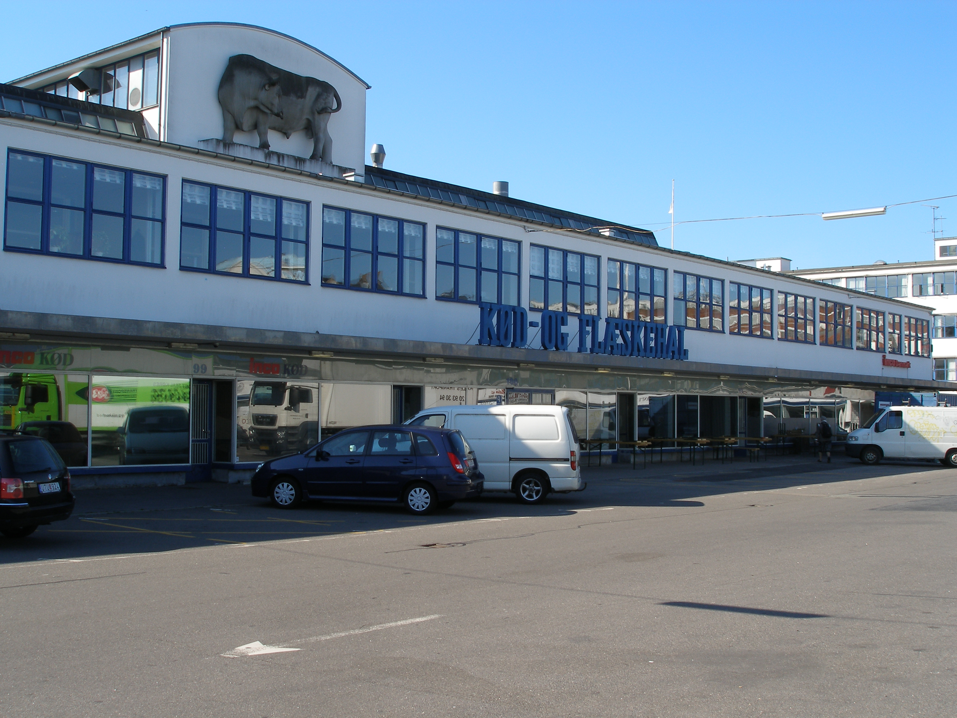 Flæskehallen (Kød- og flæskehal), Flæsketorvet, Kødbyen